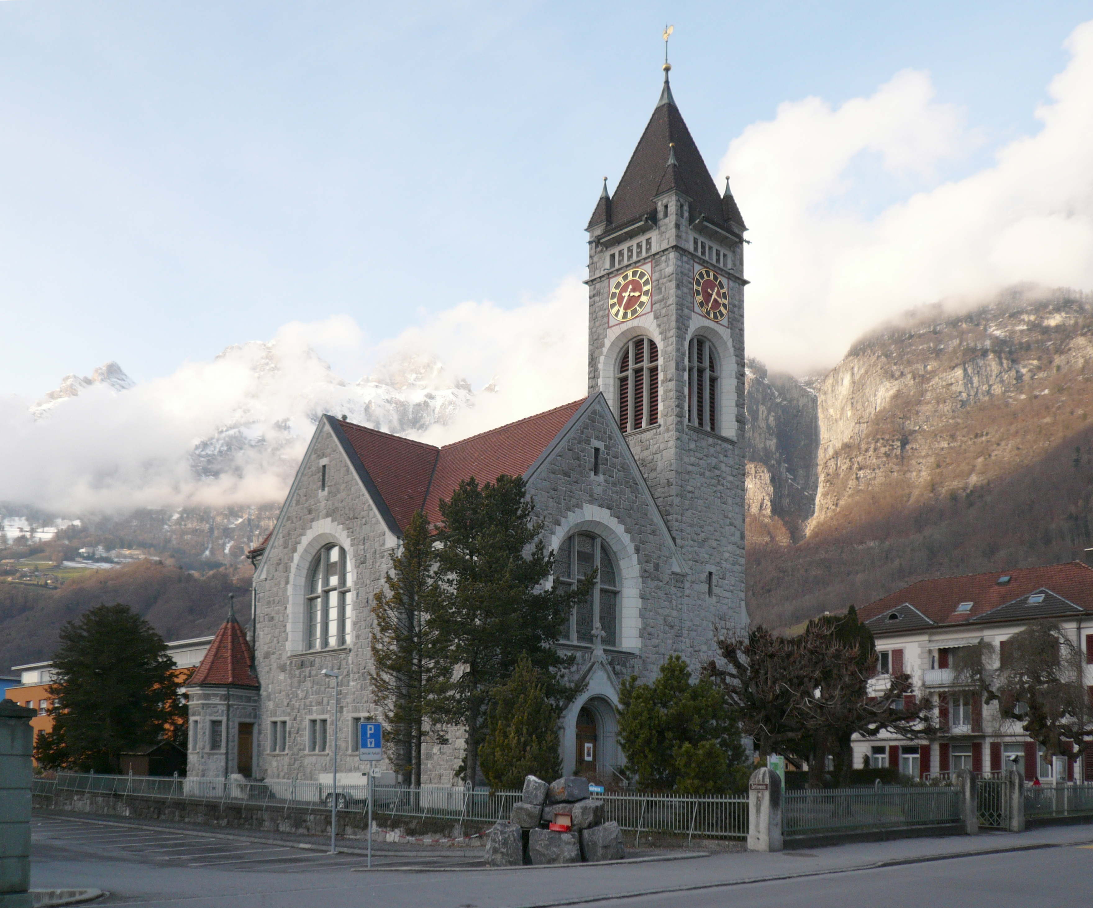 Protestant church in Walenstadt, Switzerland